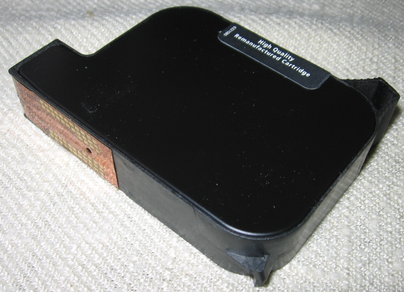 Cartridge with black ink for ink-jet printer (model hp deskjet 845c)